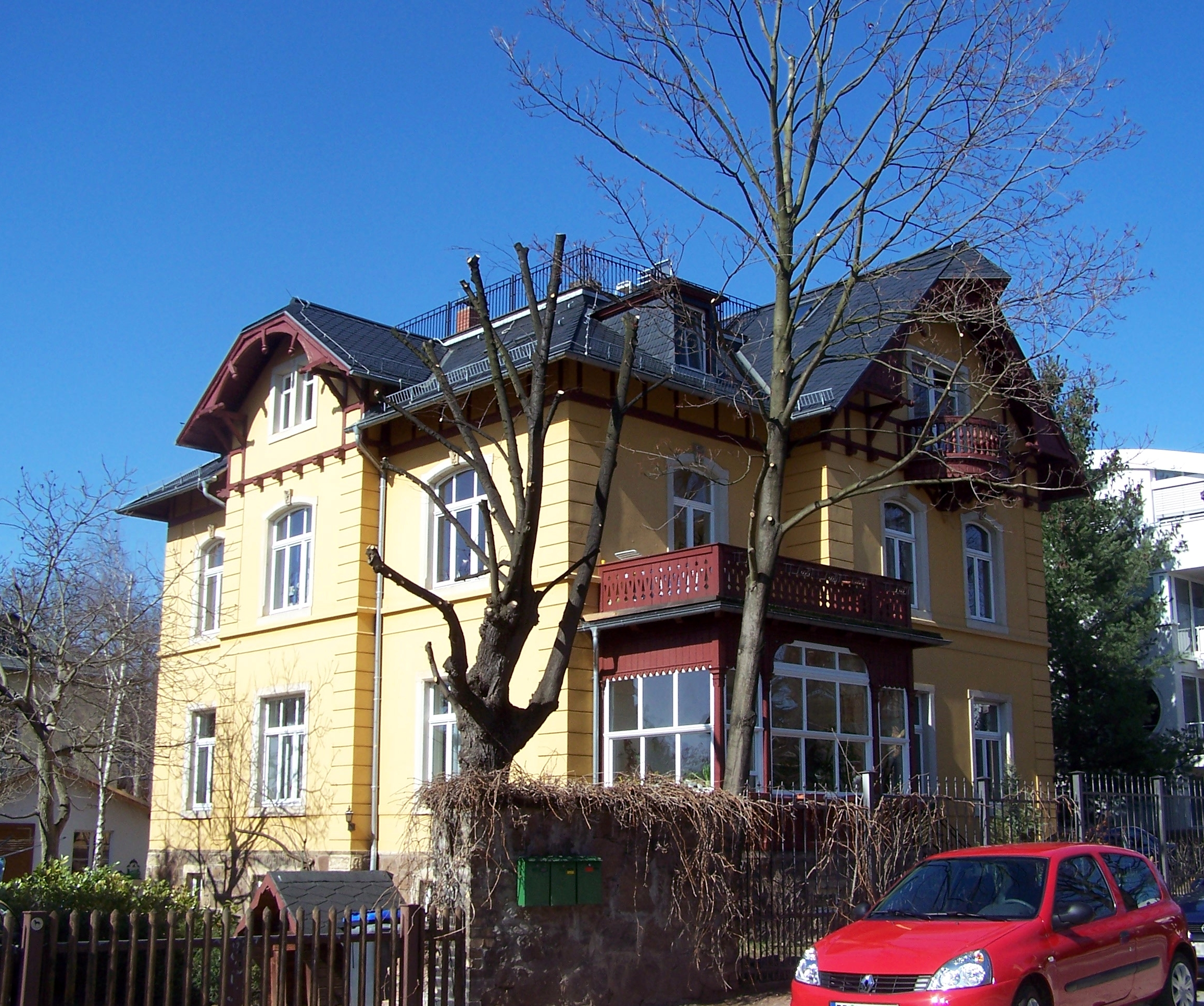 Wasastr. 59 in Radebeul